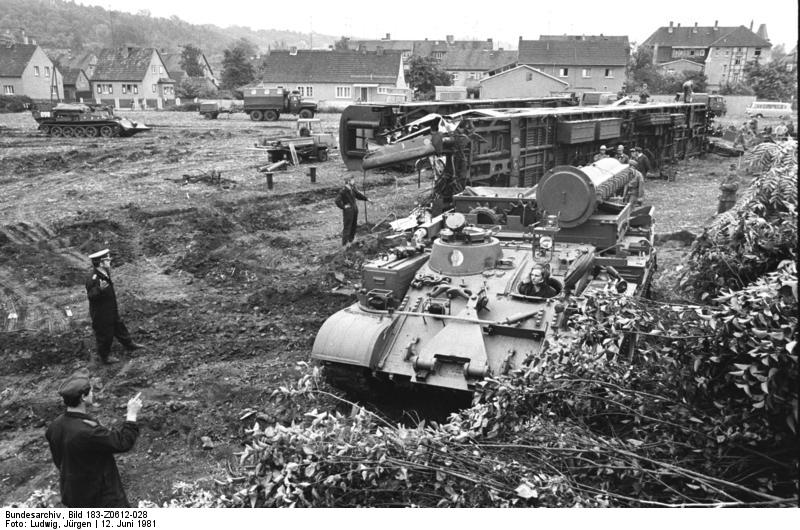 ADN-ZB Ludwig 12.6.1981 Erfurt: Eisenbahnunglück Mit Bergepanzern helfen Soldaten der NVA bei den Aufräumungsarbeiten am Unglücksort.